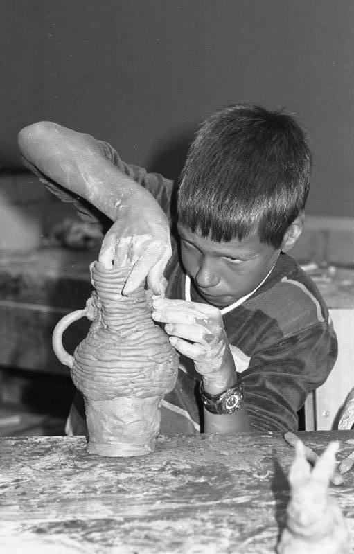 Töpfer-Kursus für Kinder im Spielhaus Medinghoven, Bonn.